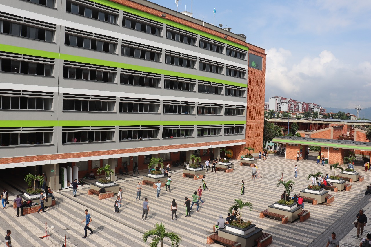 Foto Tomada por Estudiante Uteísta